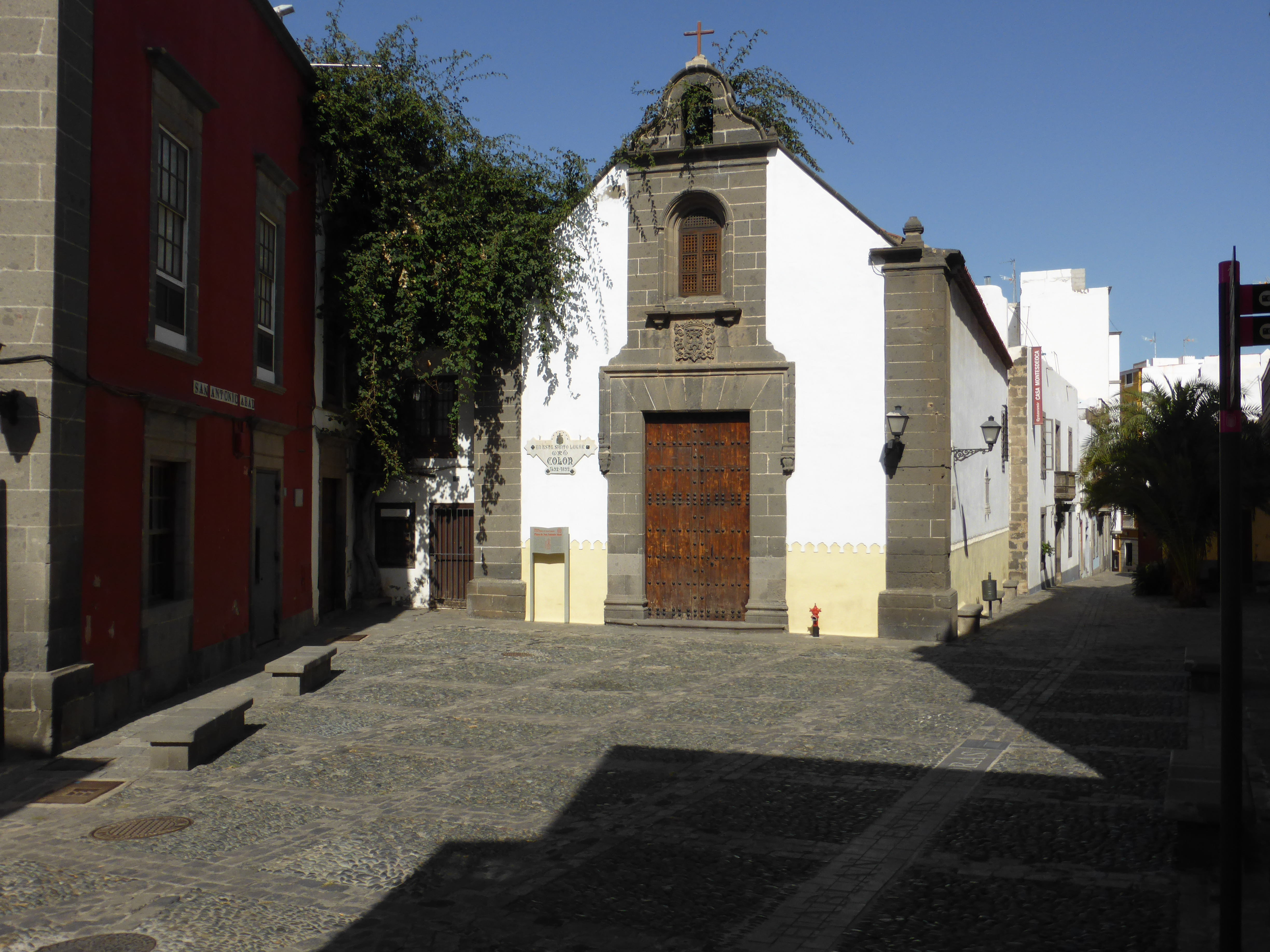 En la Plaza de San Antonio Abad está la ermita del mismo nombre. Según la tradición, en este lugar rezó Cristóbal Colón, en 1492. Así lo recuerda una placa situada en la fachada principal, que dice: "En este santo lugar oró Colón. 1492-1892". Esta ermita se encuentra en el barrio de Vegueta, de Las Palmas.